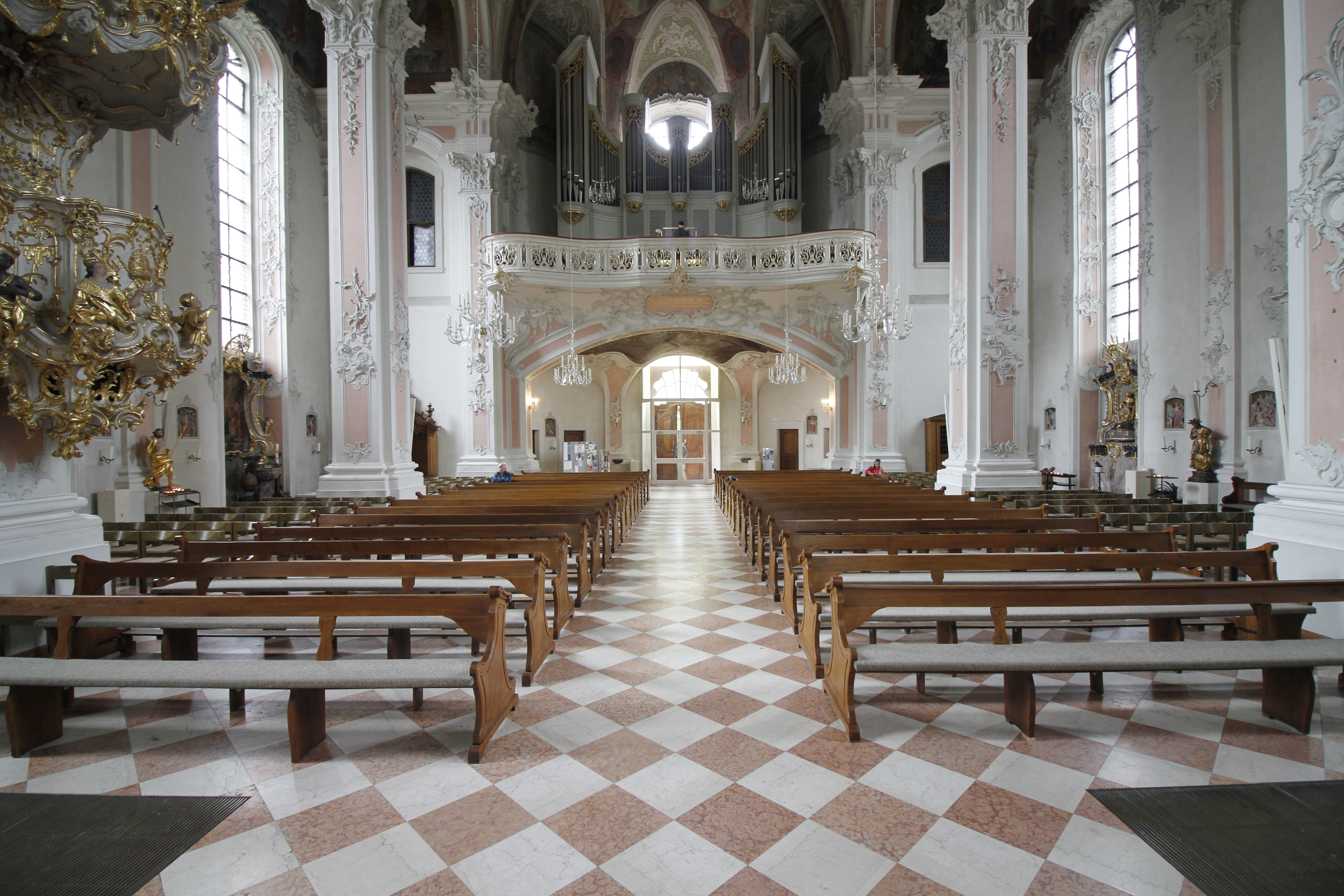 St. Peter - Mainz - Germany